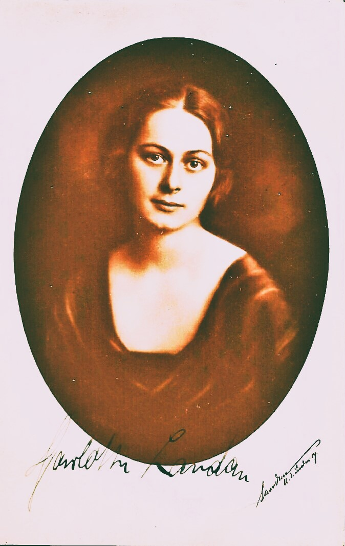 Charlotte Landau – Frauenrechtlerin, Politikerin, Lübeck um 1915. Am Rand: „Landau u. d. Linden 19“ (unter den Linden, die 4 würde ich heute eher als 9 deuten)